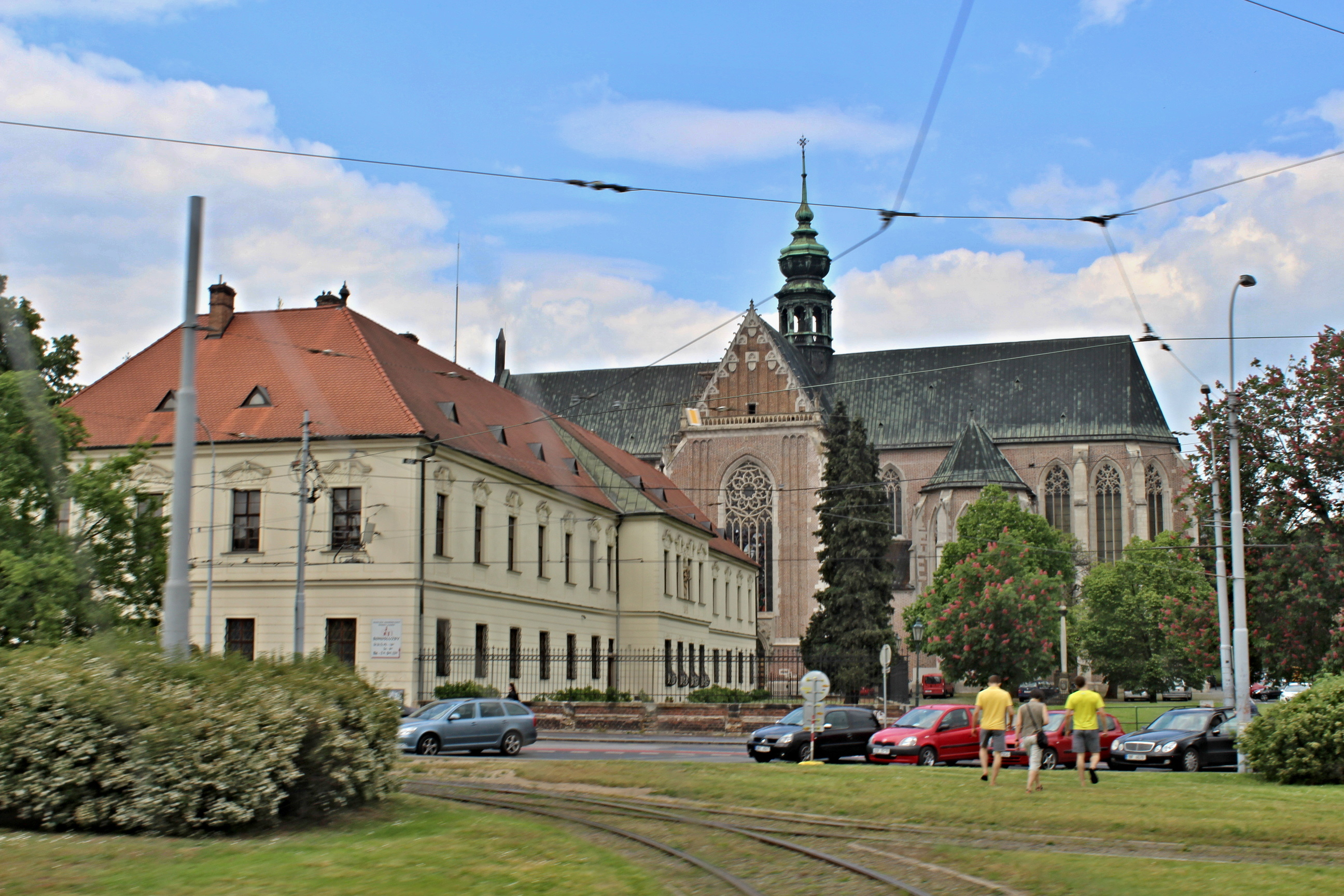 Starobrněnský klášter